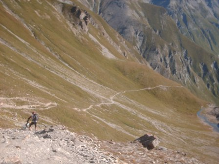 Singletrailabfahrt am Fimberpass